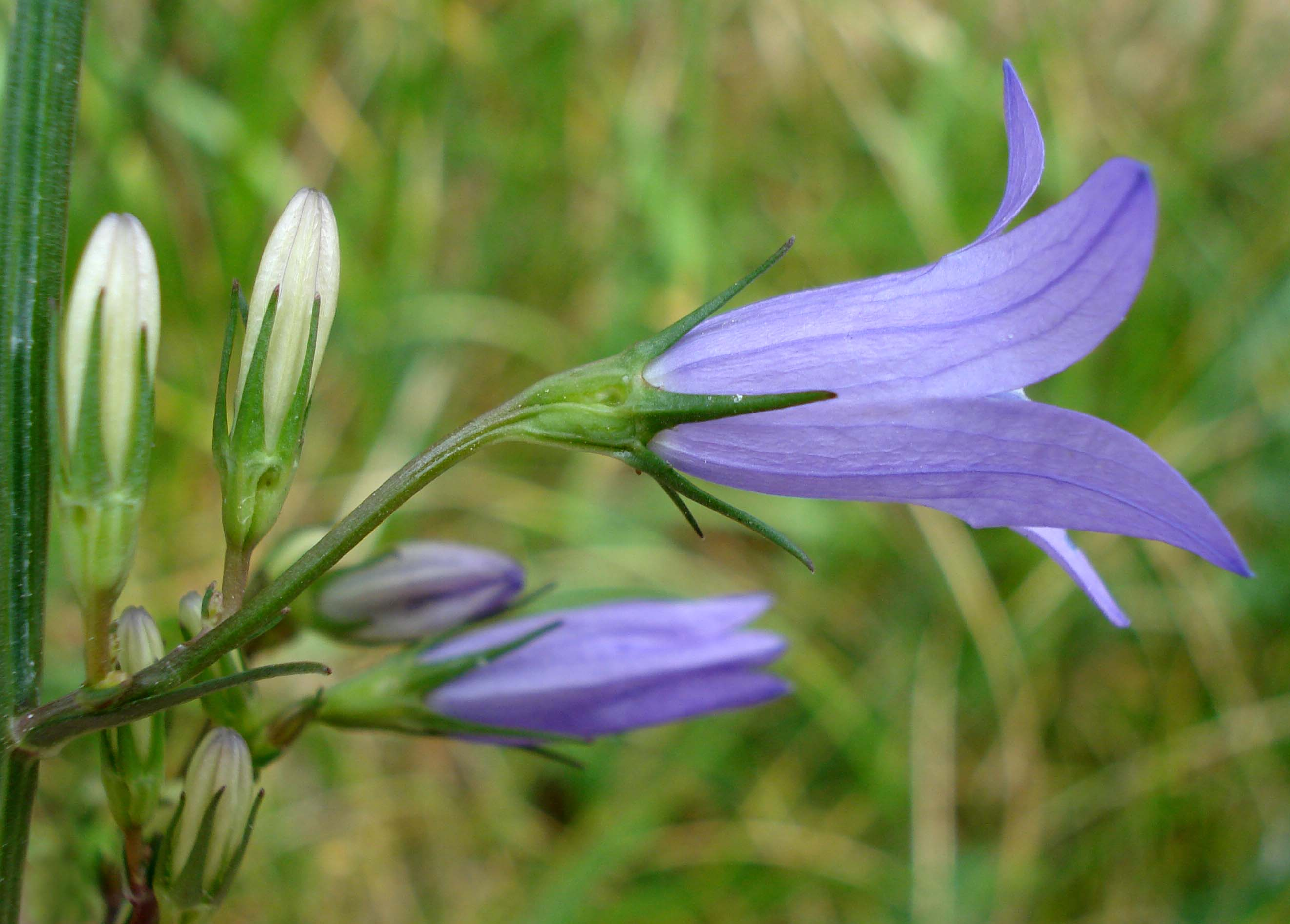 Campanula rapunculus (Unterfranken, Germany)